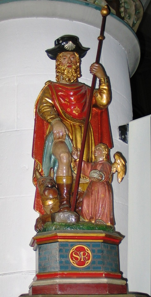 Rochus in de kerk van St Kwintens Lennik - eigen foto